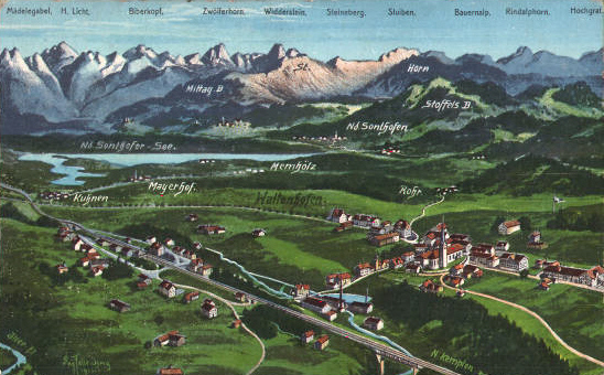 Ansichtskarte von Eugen FelleMotiv: Waltenhofen